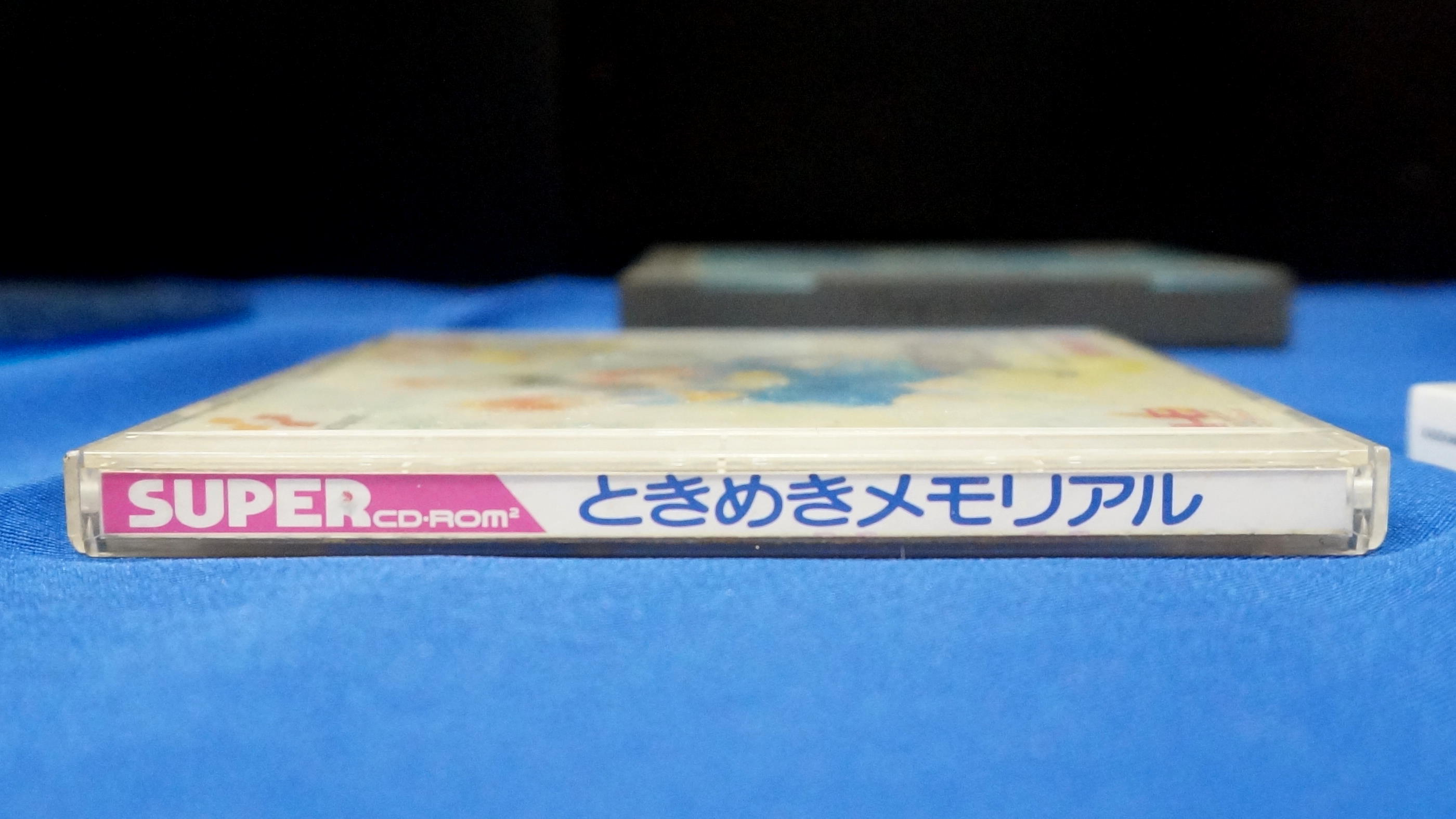 巴哈姆特電玩資訊站22週年站聚，「時代的眼淚 現代的演進」攤位展示的《純愛手札》PC Engine版SUPER CD-ROM2外盒側面。